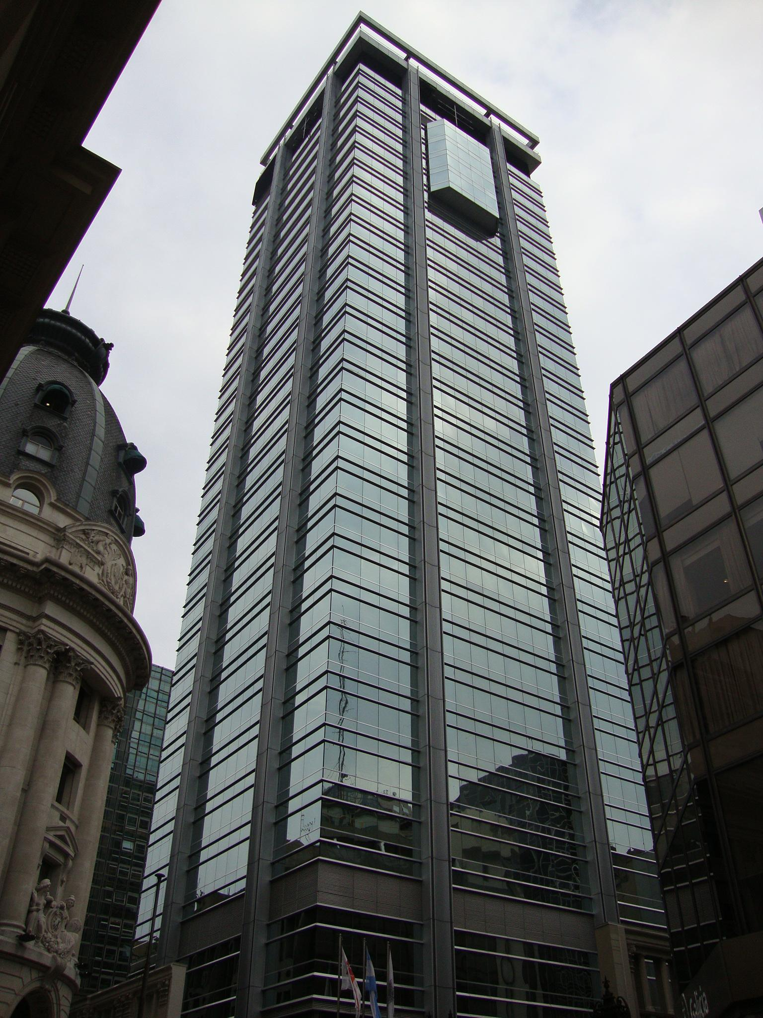 Torre Galicia Central, sede del Banco Galicia en Buenos Aires. A la izquierda, sede del BBVA Banco Francés.